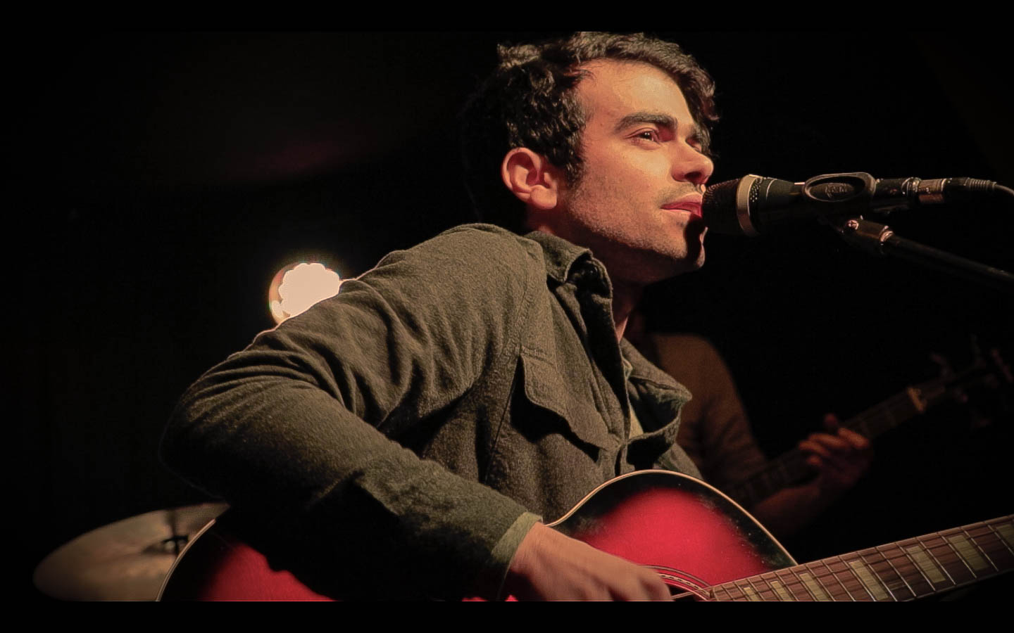 André Ubilla, artista chileno contemporáneo. Presentación en vivo, Berlin 2017.